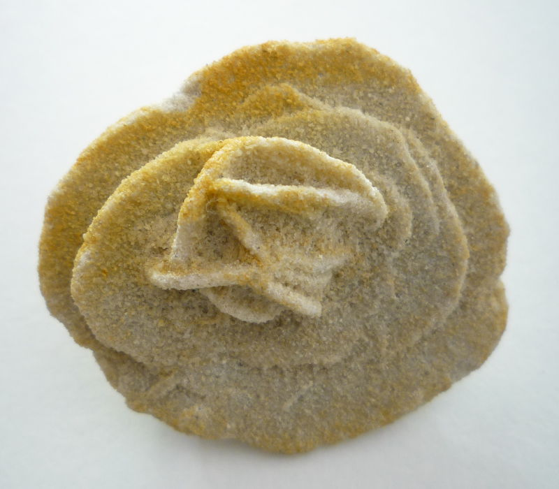 Rockenberger Sandrose (Barytrose aus der Sandgrube Rockenberg bei Butzbach/Hessen; Vorderseite)